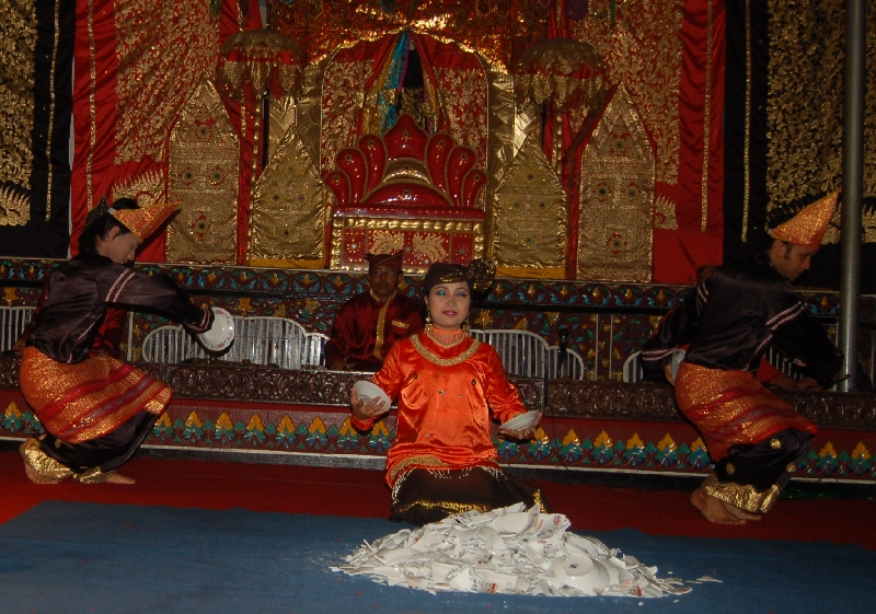 Tarian Piring di Balai Kebudayaan Bukit Tinggi, Sumatera Barat Jun 2008